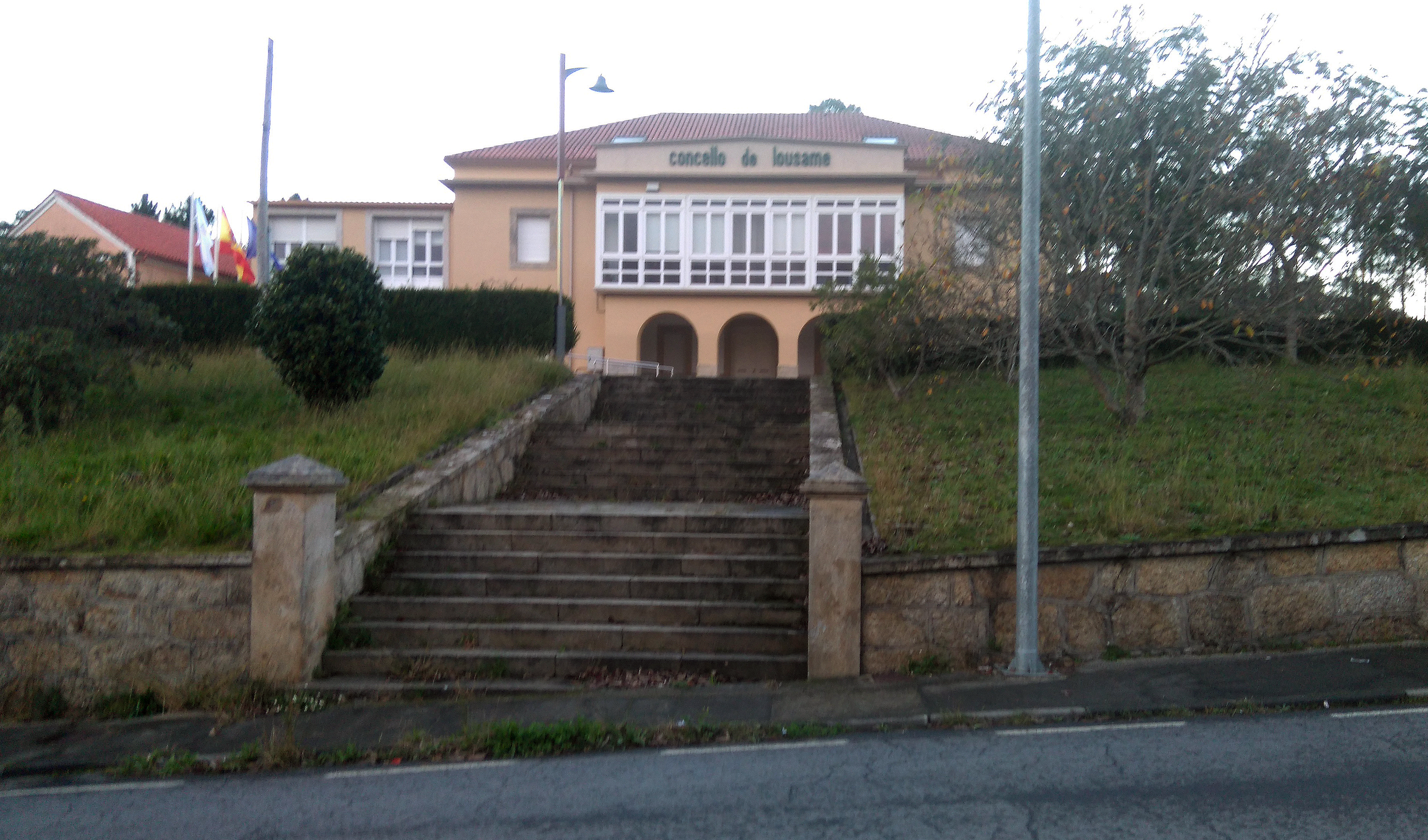 Casa consistorial de Lousame en 2015